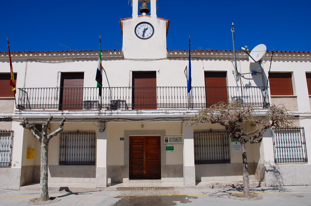 Ayuntamiento de Saucedilla (Cáceres)